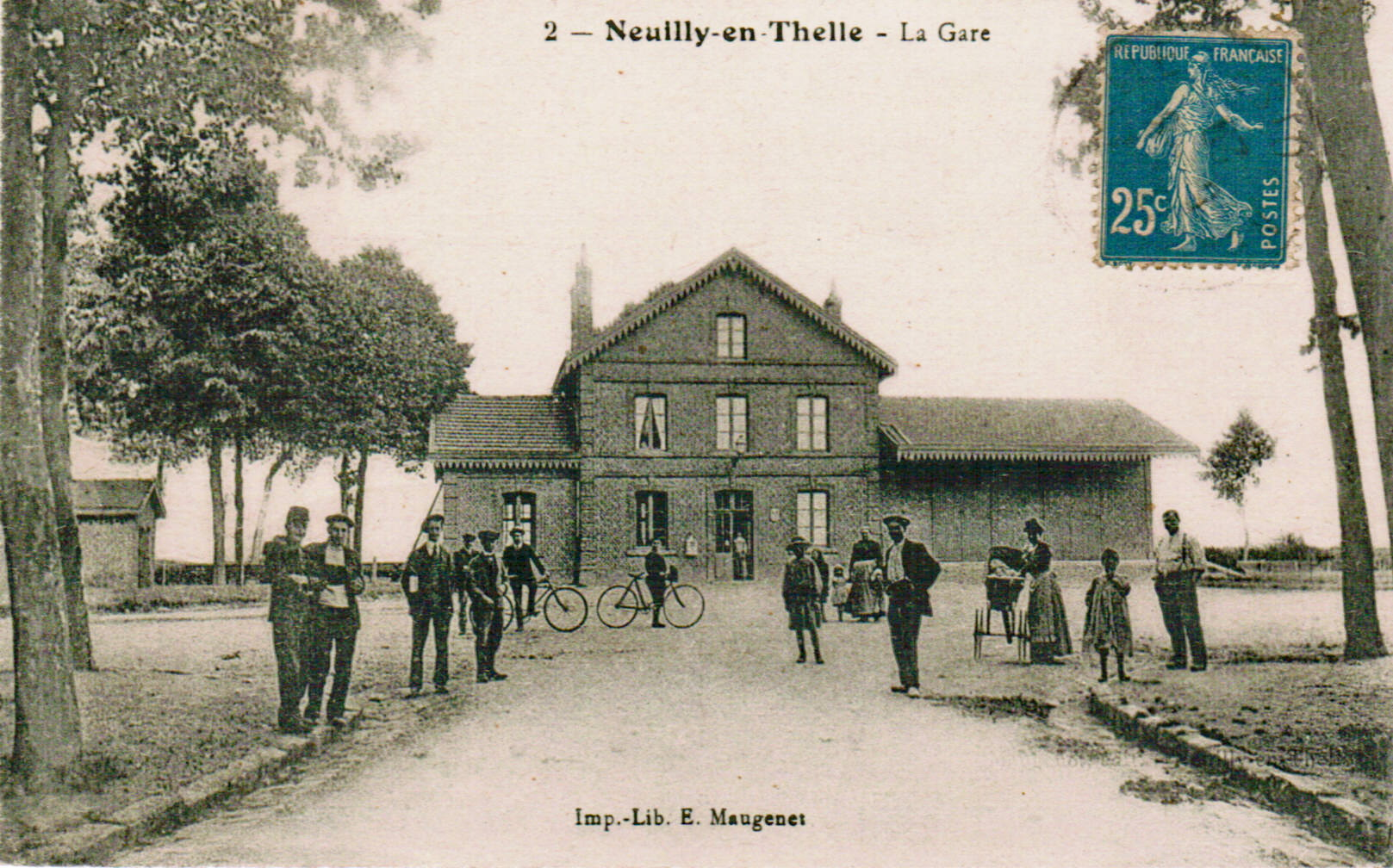 Carte postale ancienne éditée par Imp.-Lib. E. Maugenet NEUILLY-EN-THELLE - La Gare